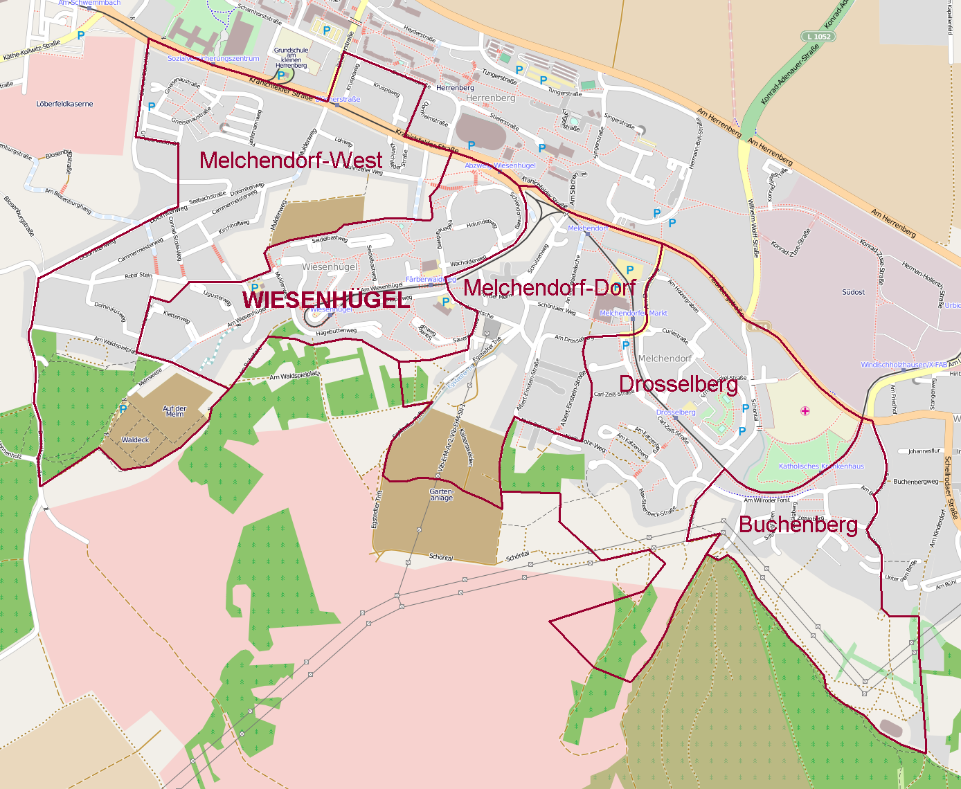 Eine Karte der Viertel im Stadtteil Melchendorf von Erfurt.